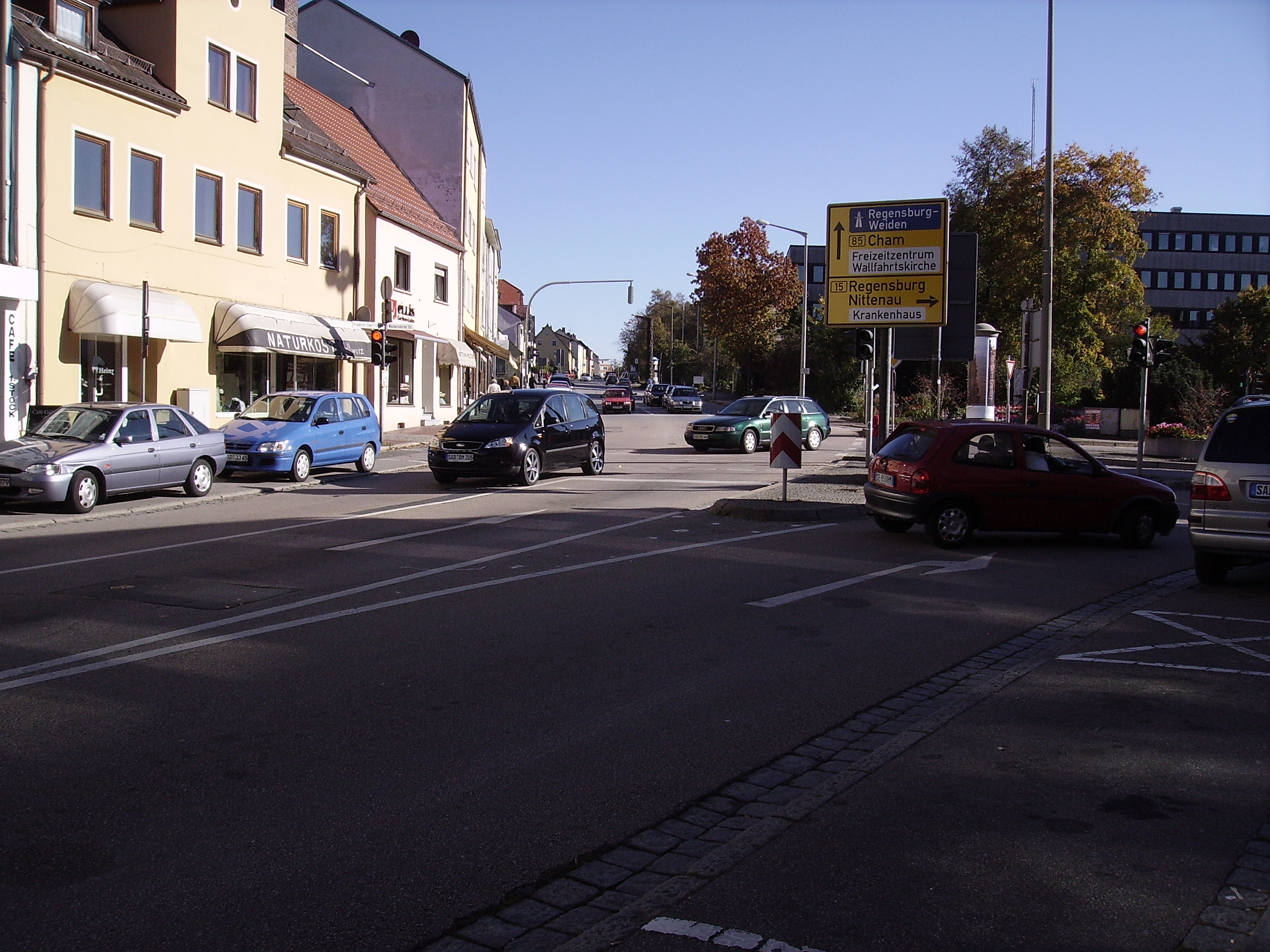 Beschreibung: Wendelinplatz Schwandorf Quelle: Bild selbst erstellt Datum: 21. Dezember 2006 Autor: Midtown Manhattan